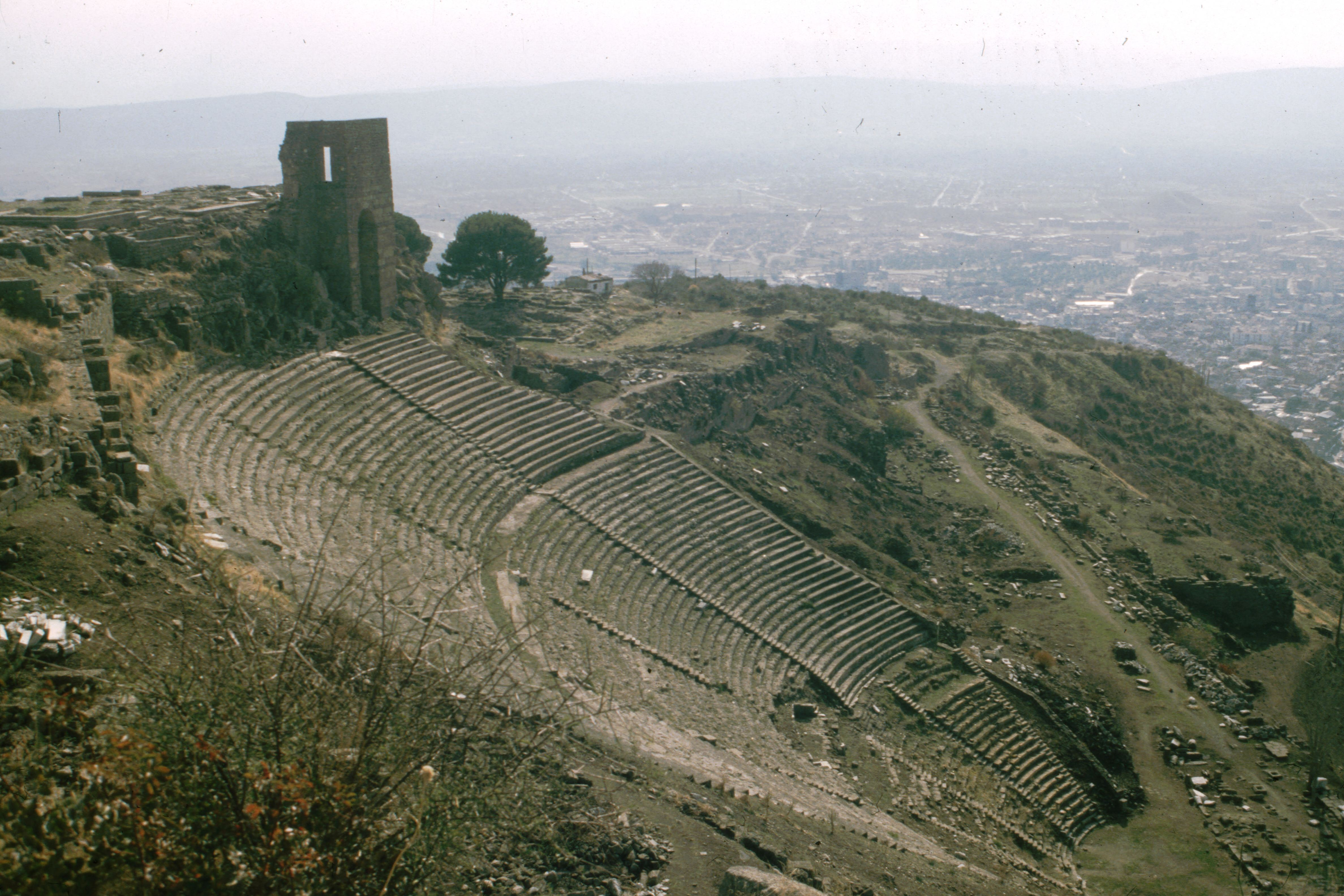 Pergamon,_Theater_am_Hang